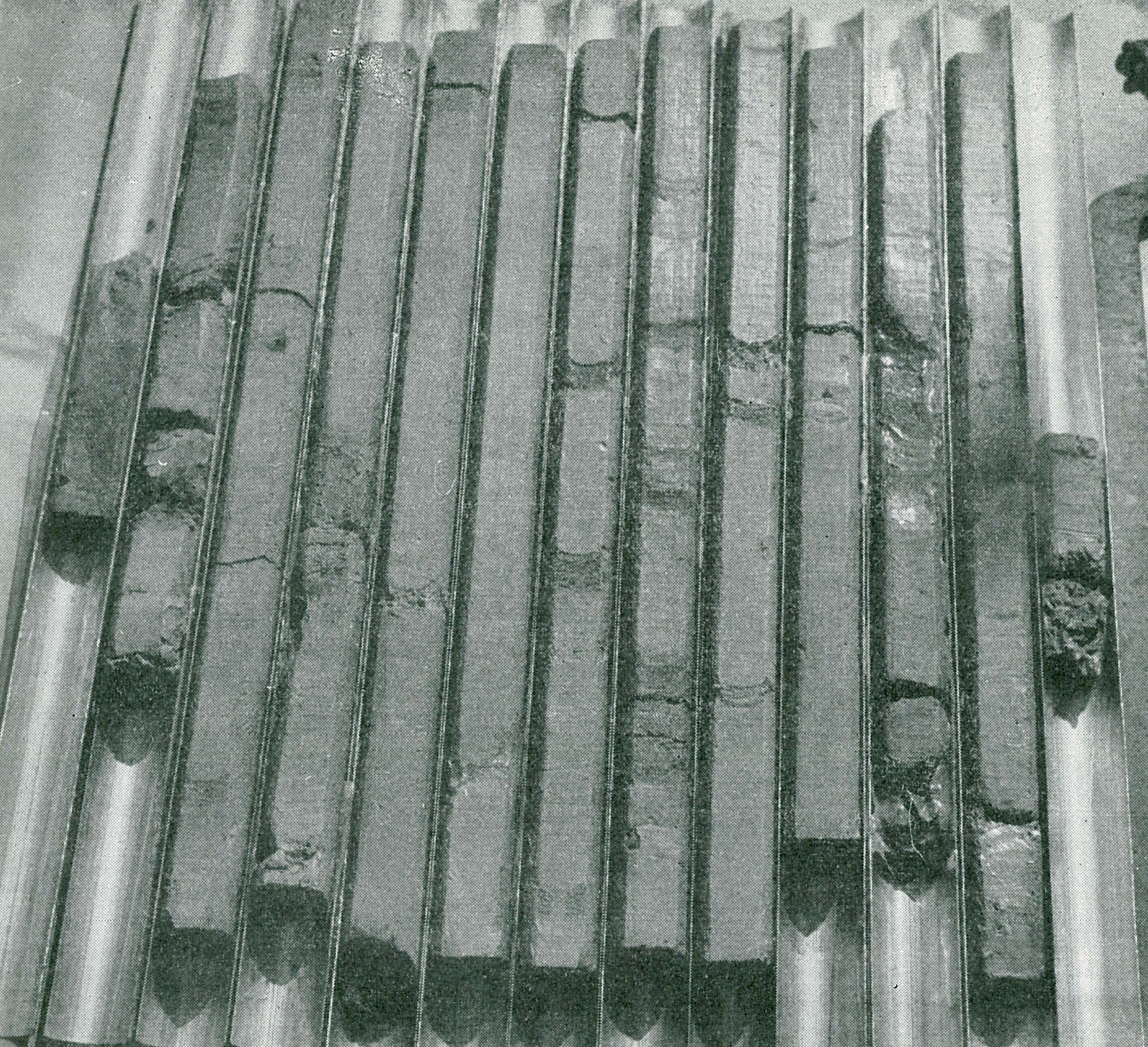 deep sea Sedimentcore